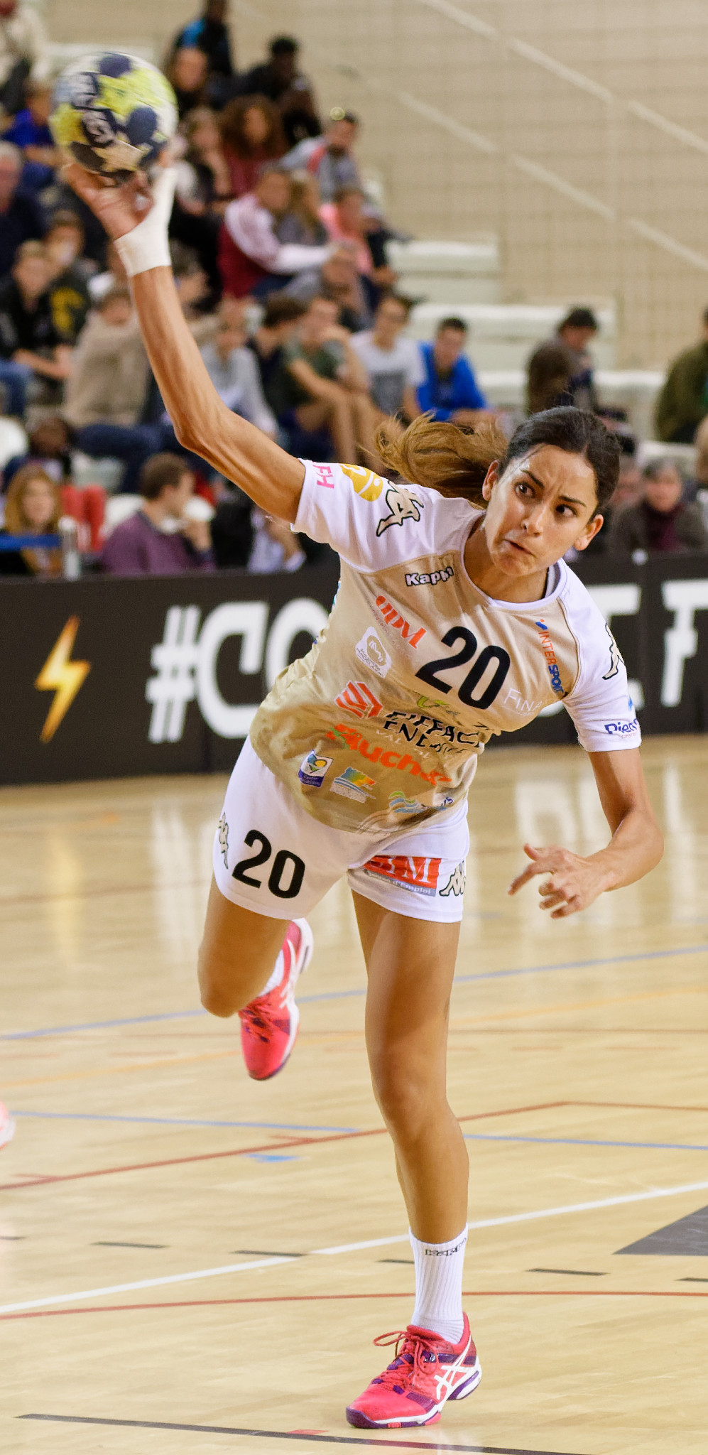 Rencontre Issy Paris Hand / Chambray. A Issy Les Moulineaux, le 15 septembre 2017.